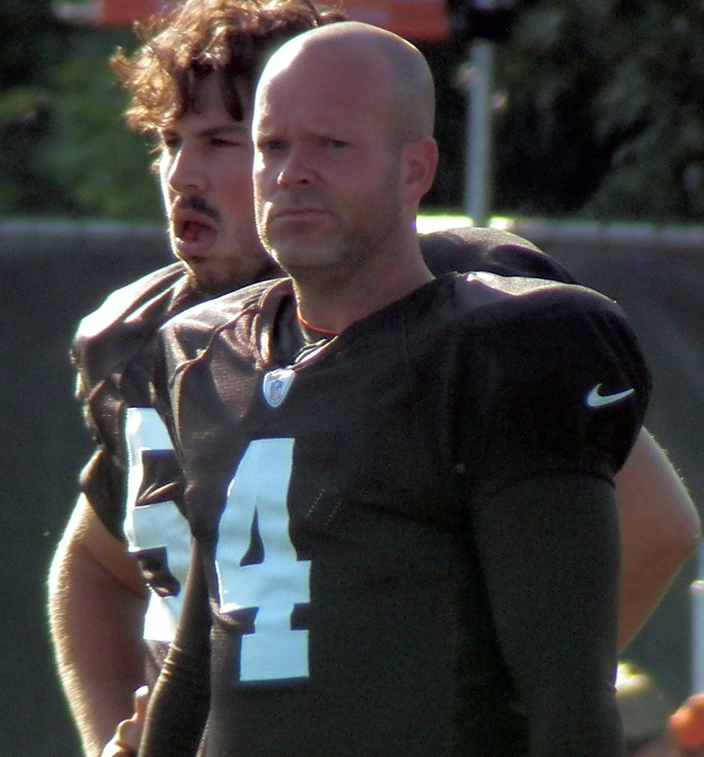 2012 Training Camp